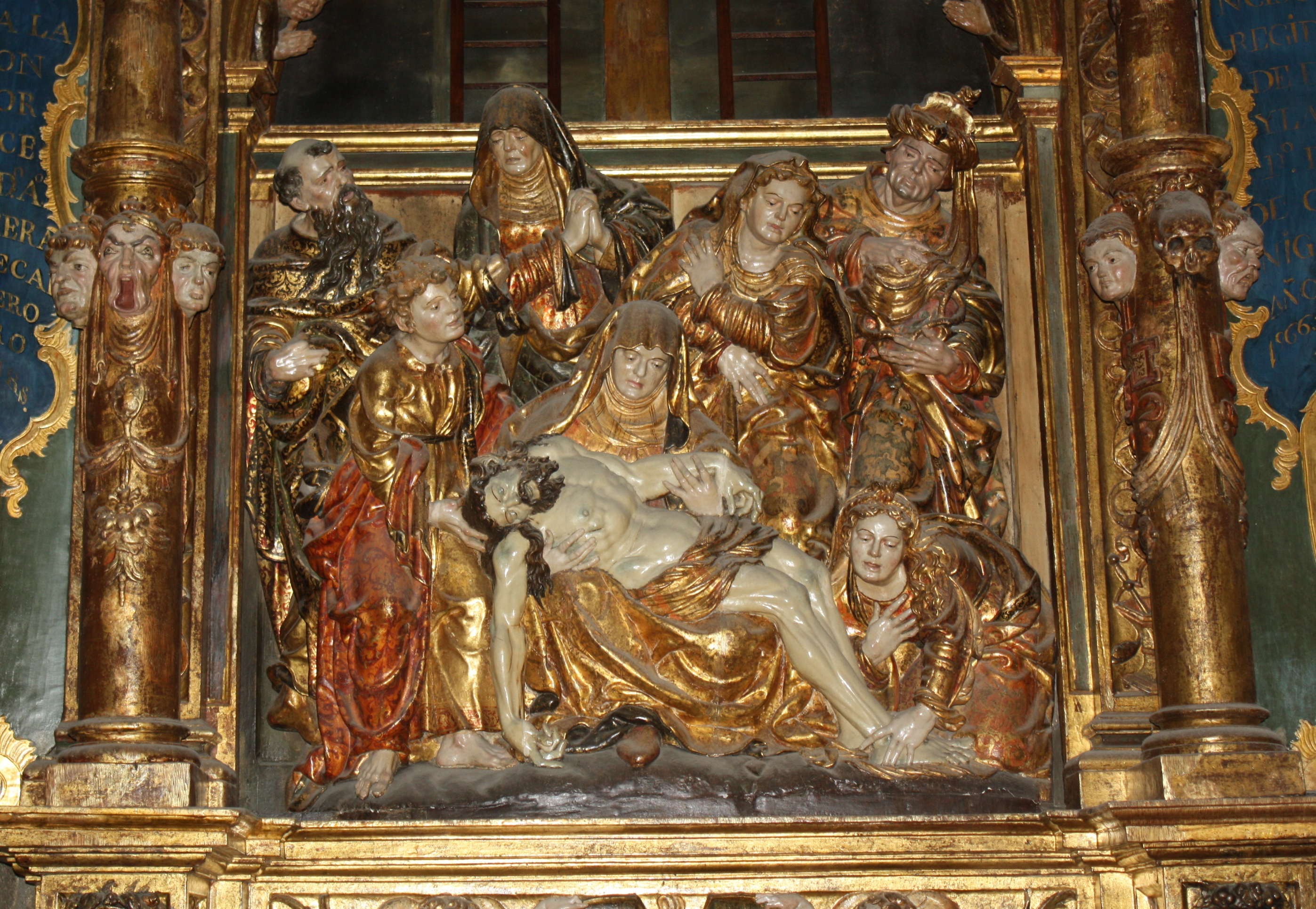 Retablo da Quinta Angustia, obra do Mestre de Sobrado, cara 1547, no cruceiro norte da Catedral de Ourense.